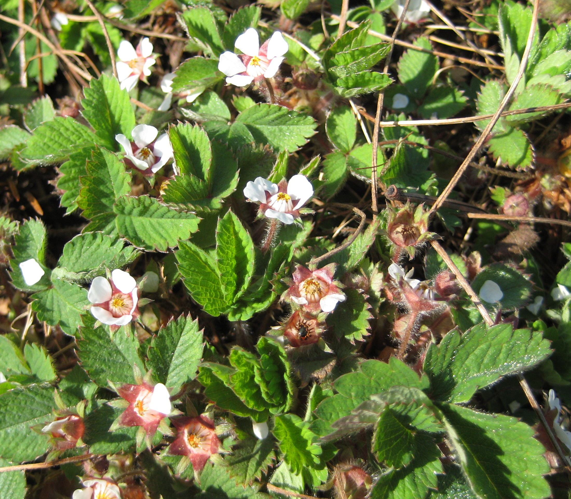 Potentilla micrantha im Botanischen Garten Dresden